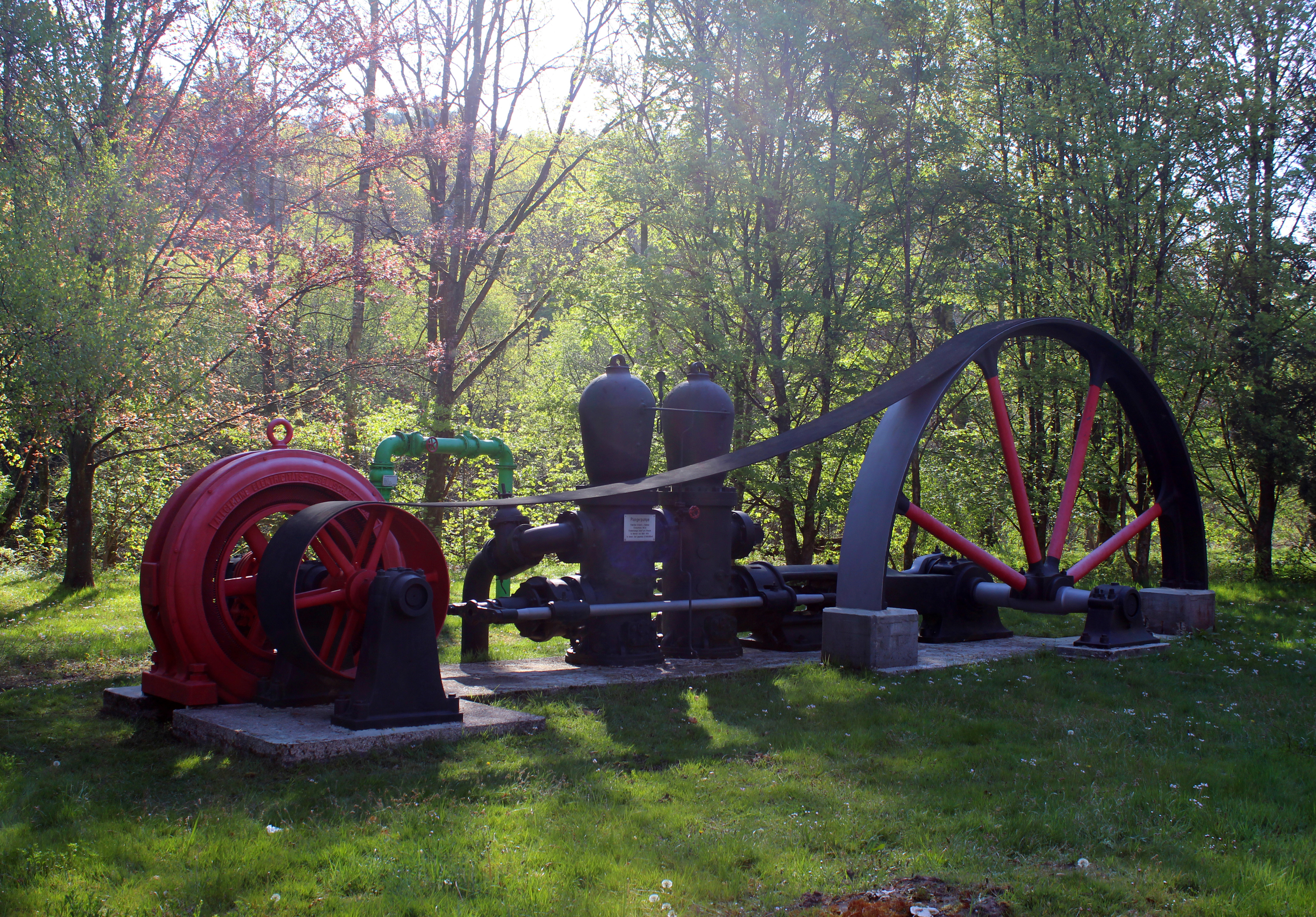 Plungerpumpe, Spiesermühltal, Saarland